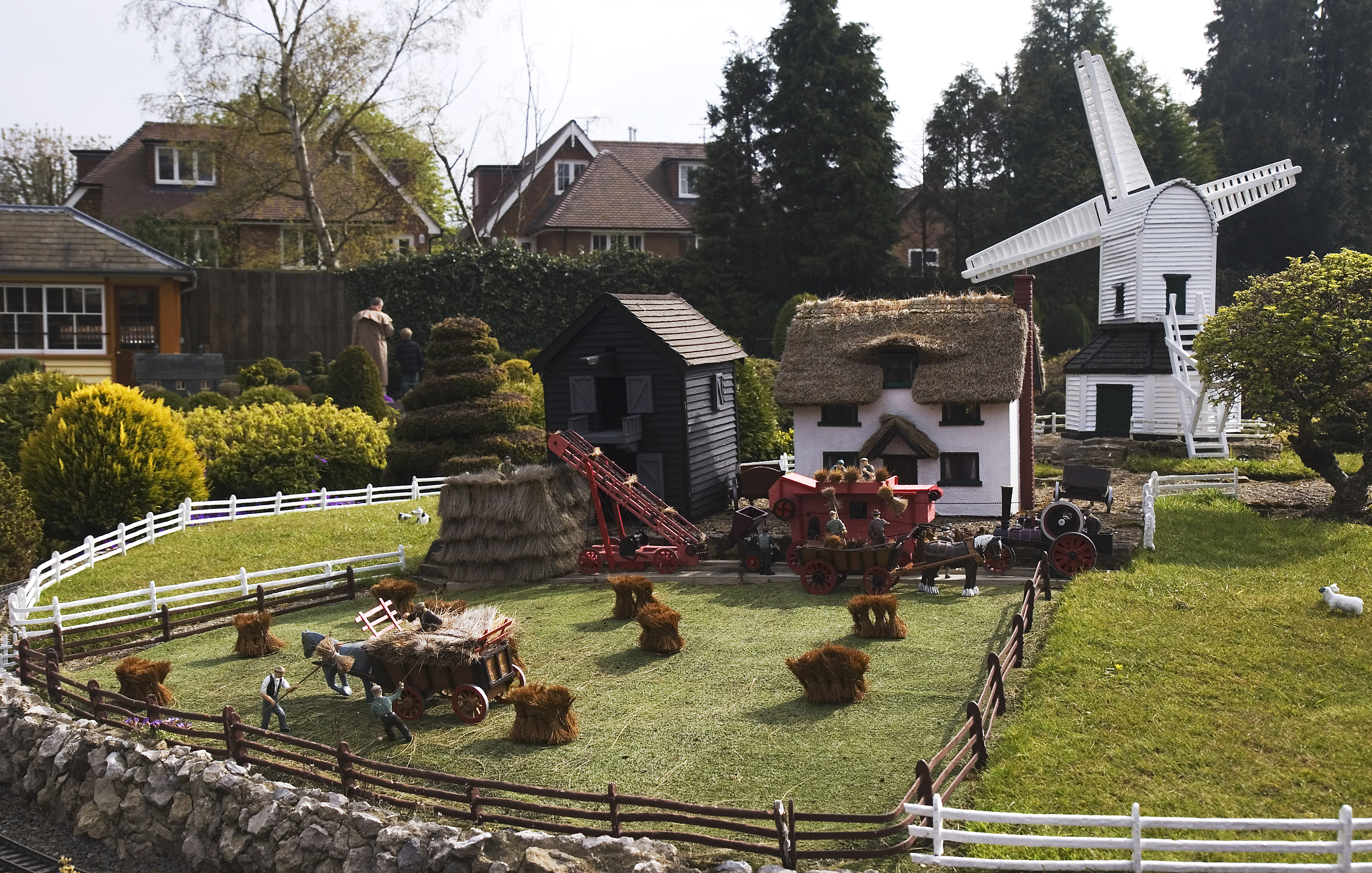 Harvest, Bekonscot